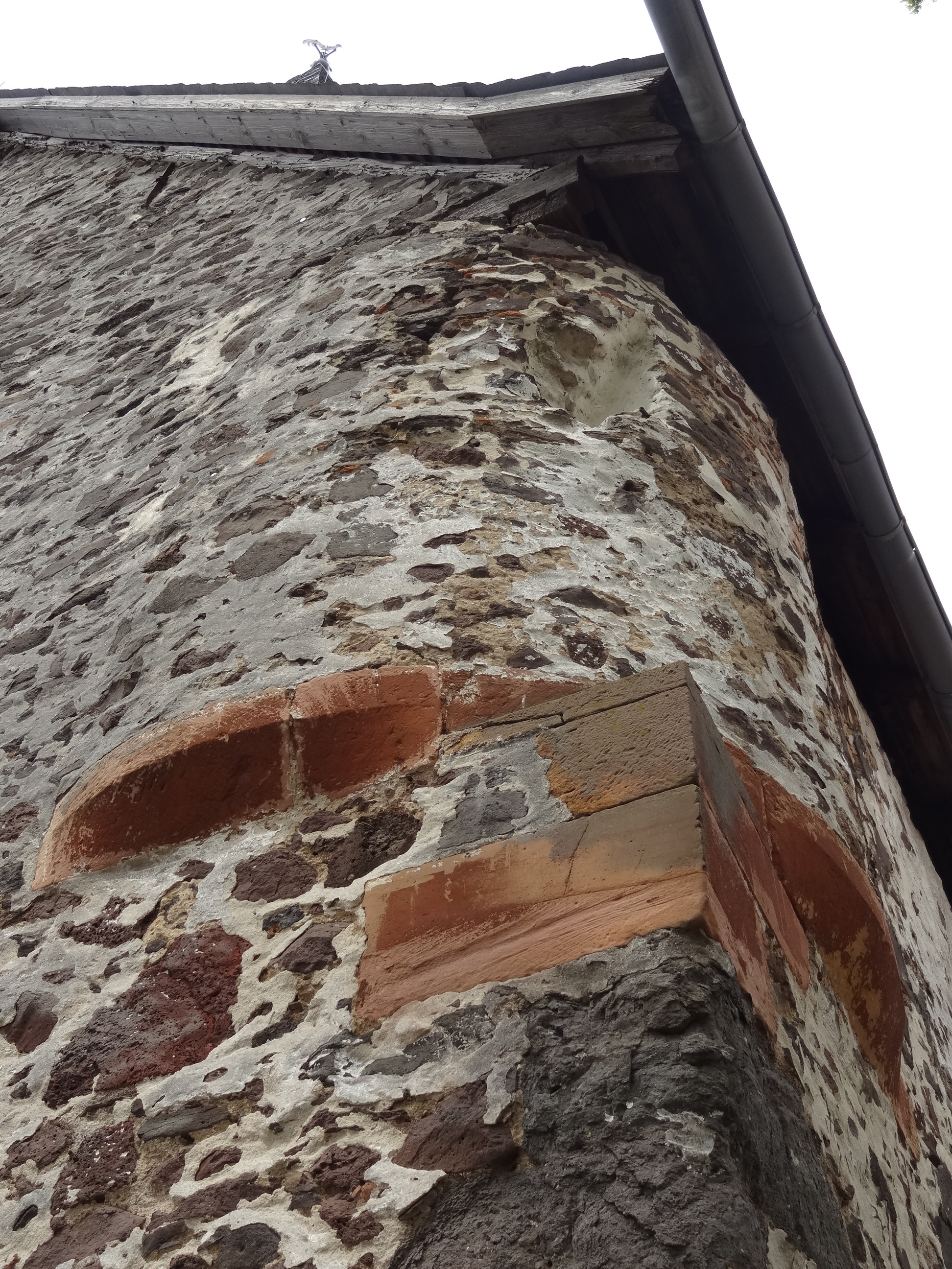 Evangelische Kirche Stornfels